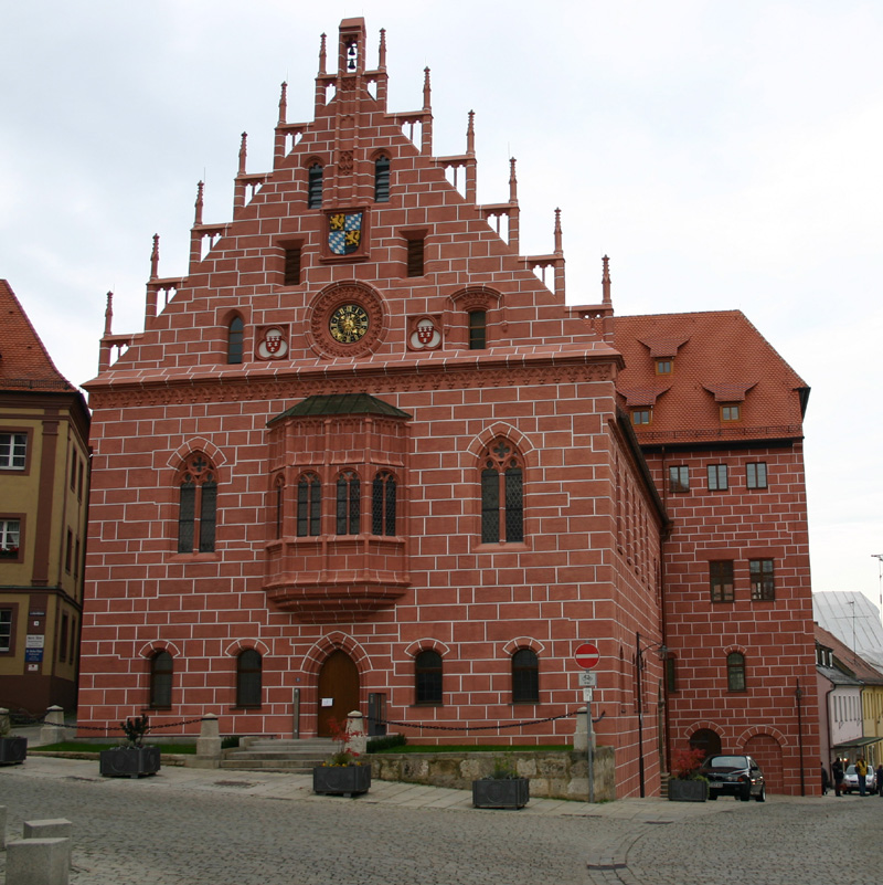 Gotisches Rathaus von Sulzbach-Rosenberg Copyright Status: GNU Freie Dokumentationslizenz Originalgröße: 3072 x 2048 (Ausschnitt, skaliert)